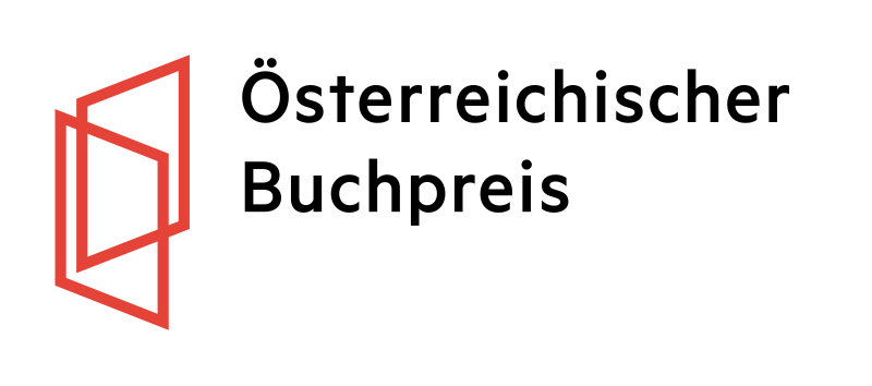 Logo des Österreichischen Buchpreises